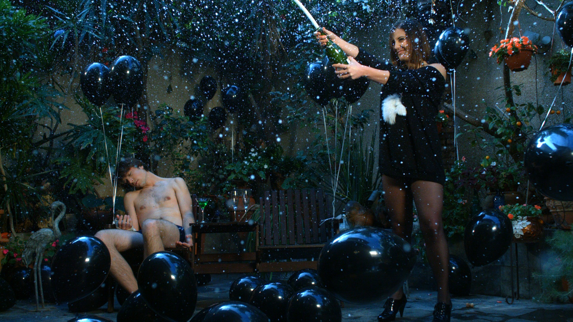 מוריה אור בקליפ